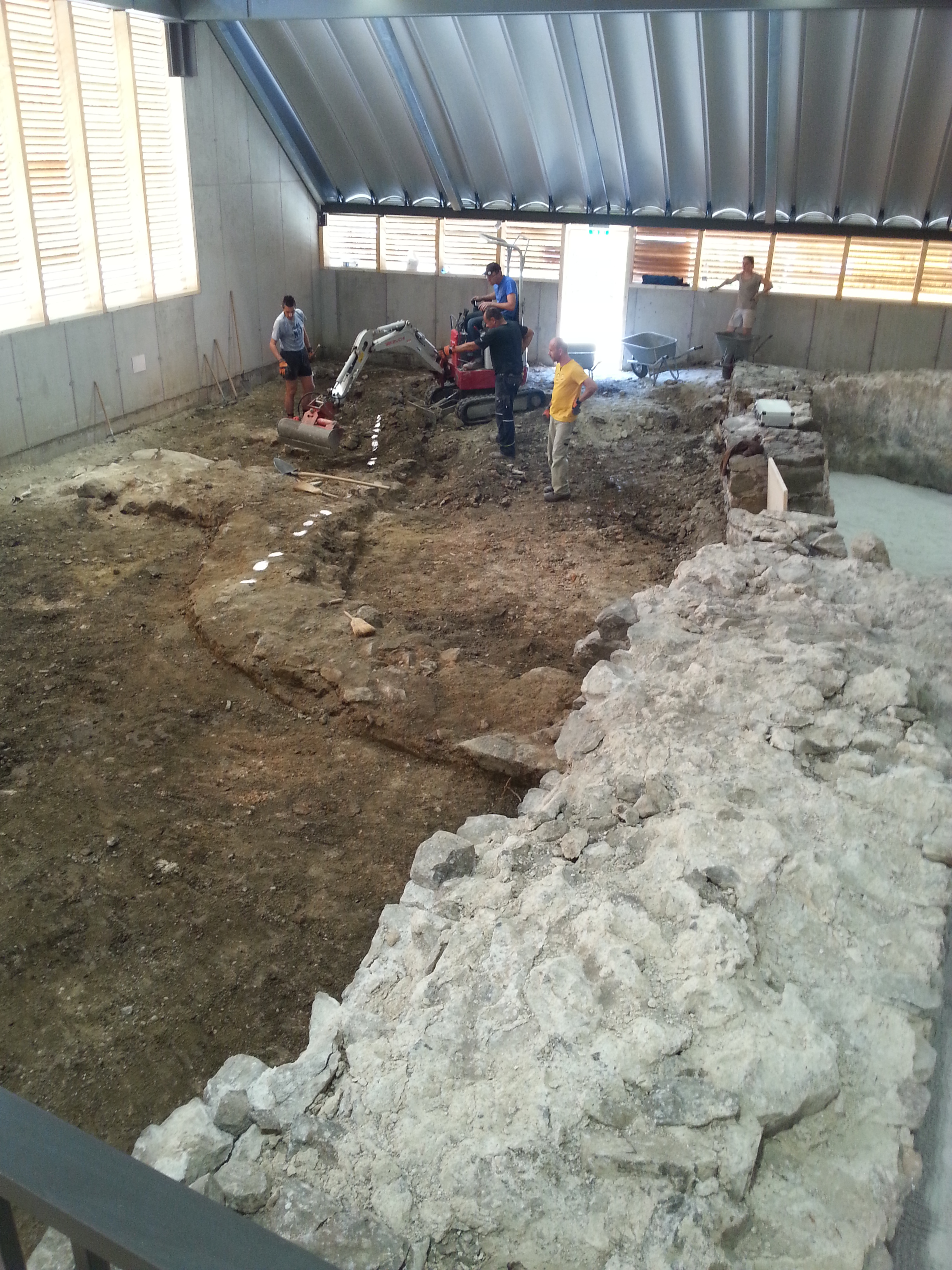 Mitarbeiter der Grabungsfirma Archeonova bei der Freilegung des Nordwestturms des spätrömischen Burgus von Oberranna (2018).